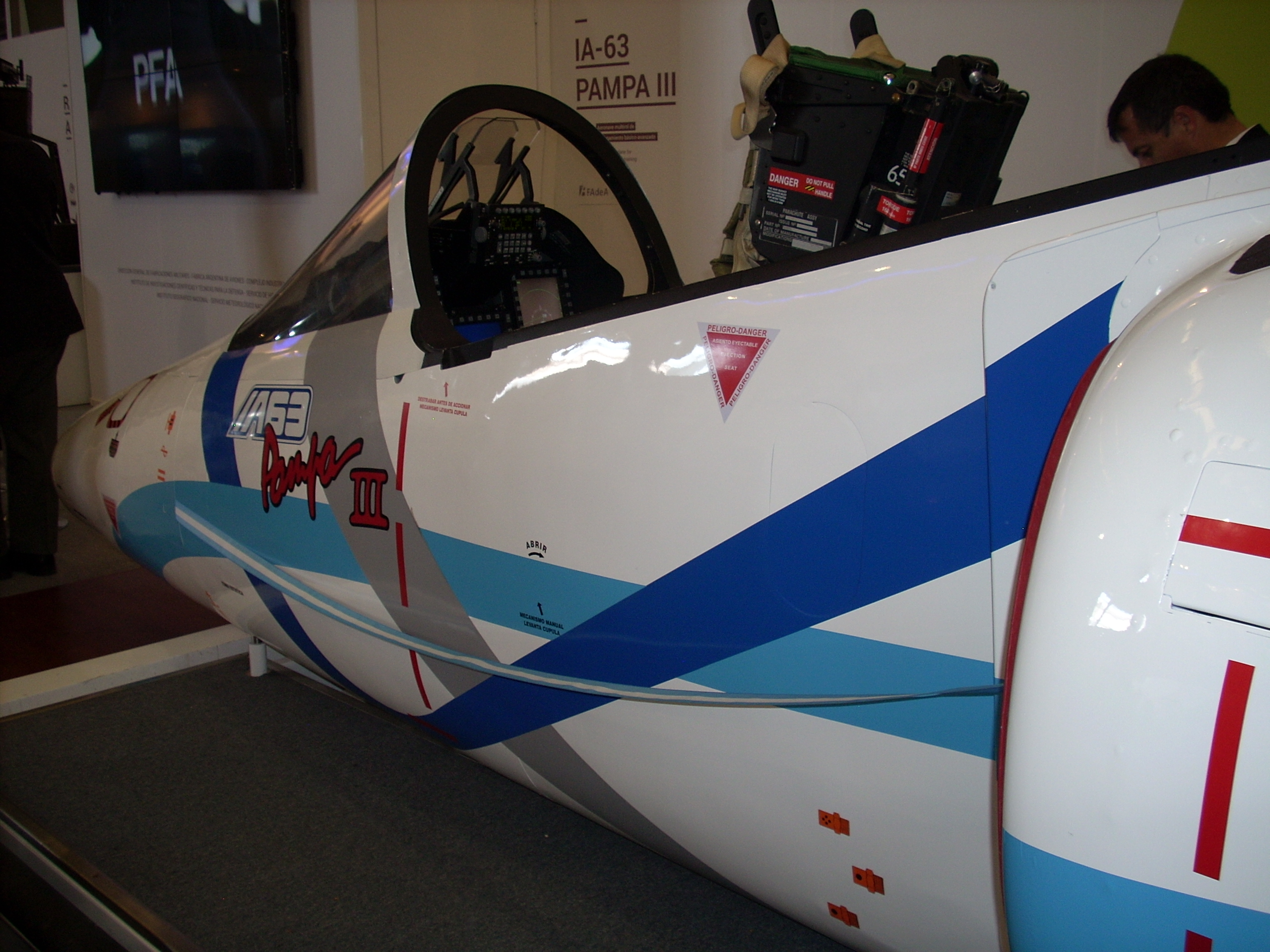 FIDAE 2014 - IA63 Pampa III FAA - DSCN0606